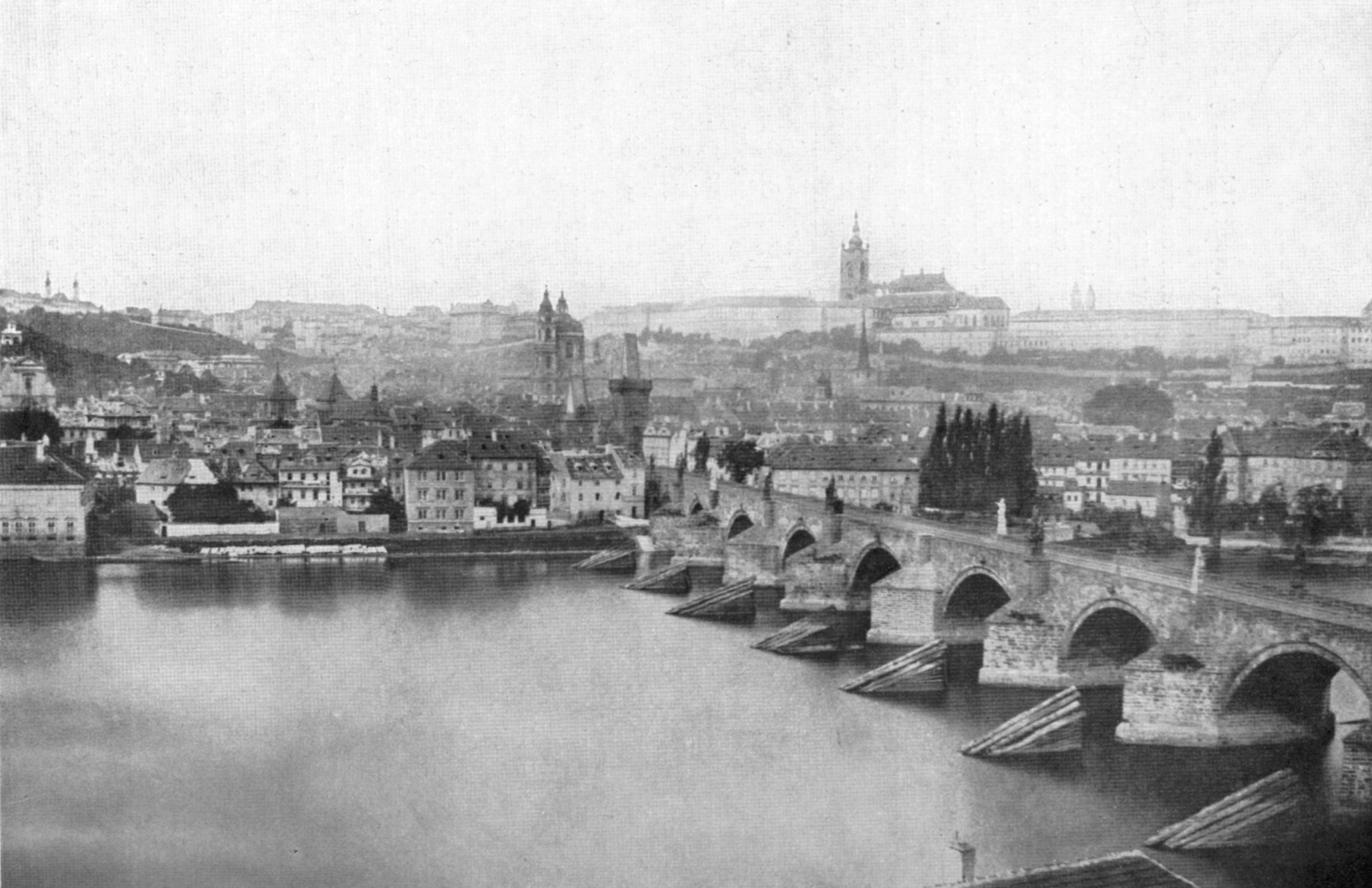 A. Groll - Panorama Malé strany a Hradčan 1856